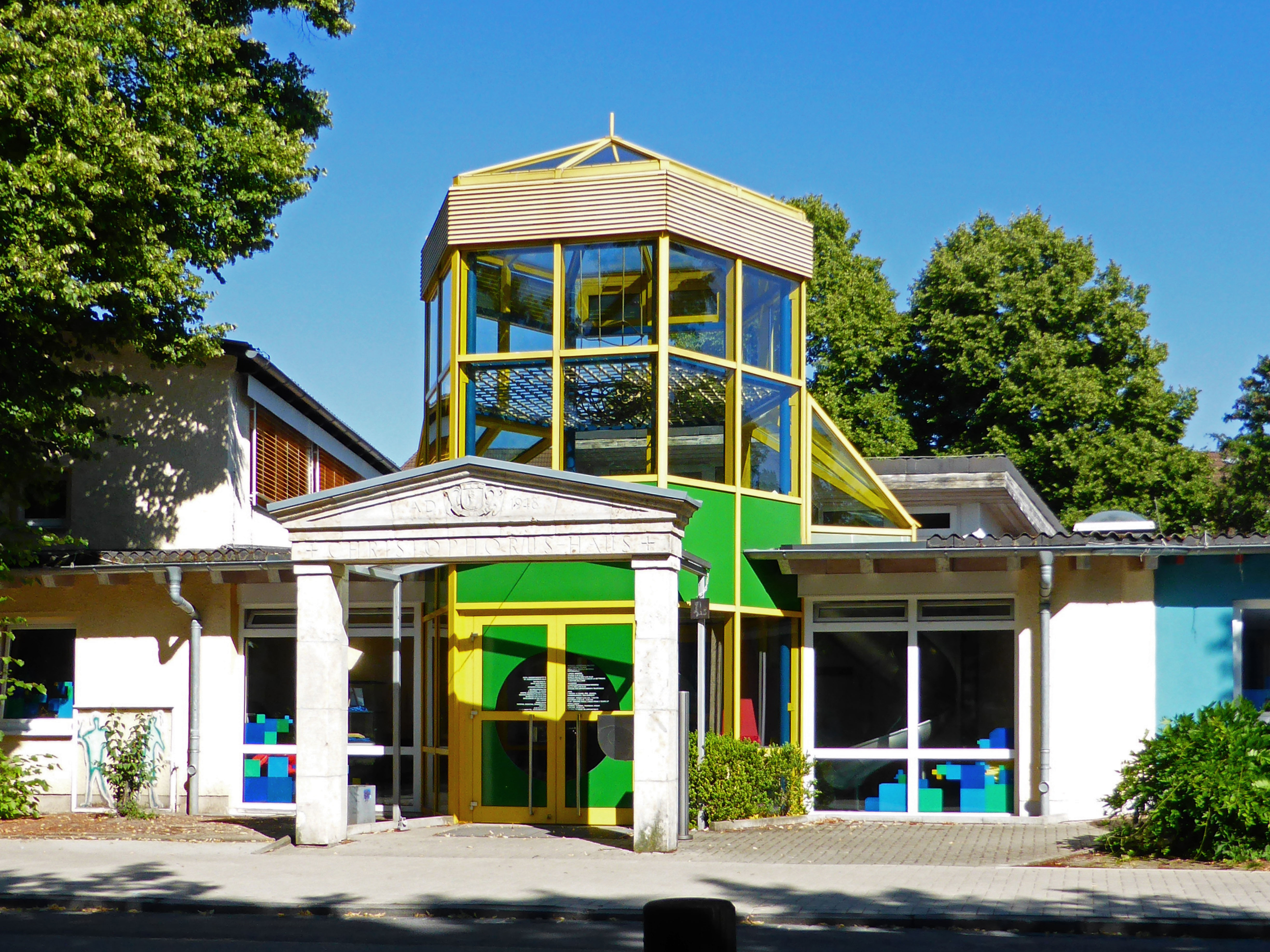 Eingangsbereich der Kindertagesstätte "Christophorus-Haus" in Wolfsburg: Torbogen von 1948, Gebäude von 1960, Turm von 1999.